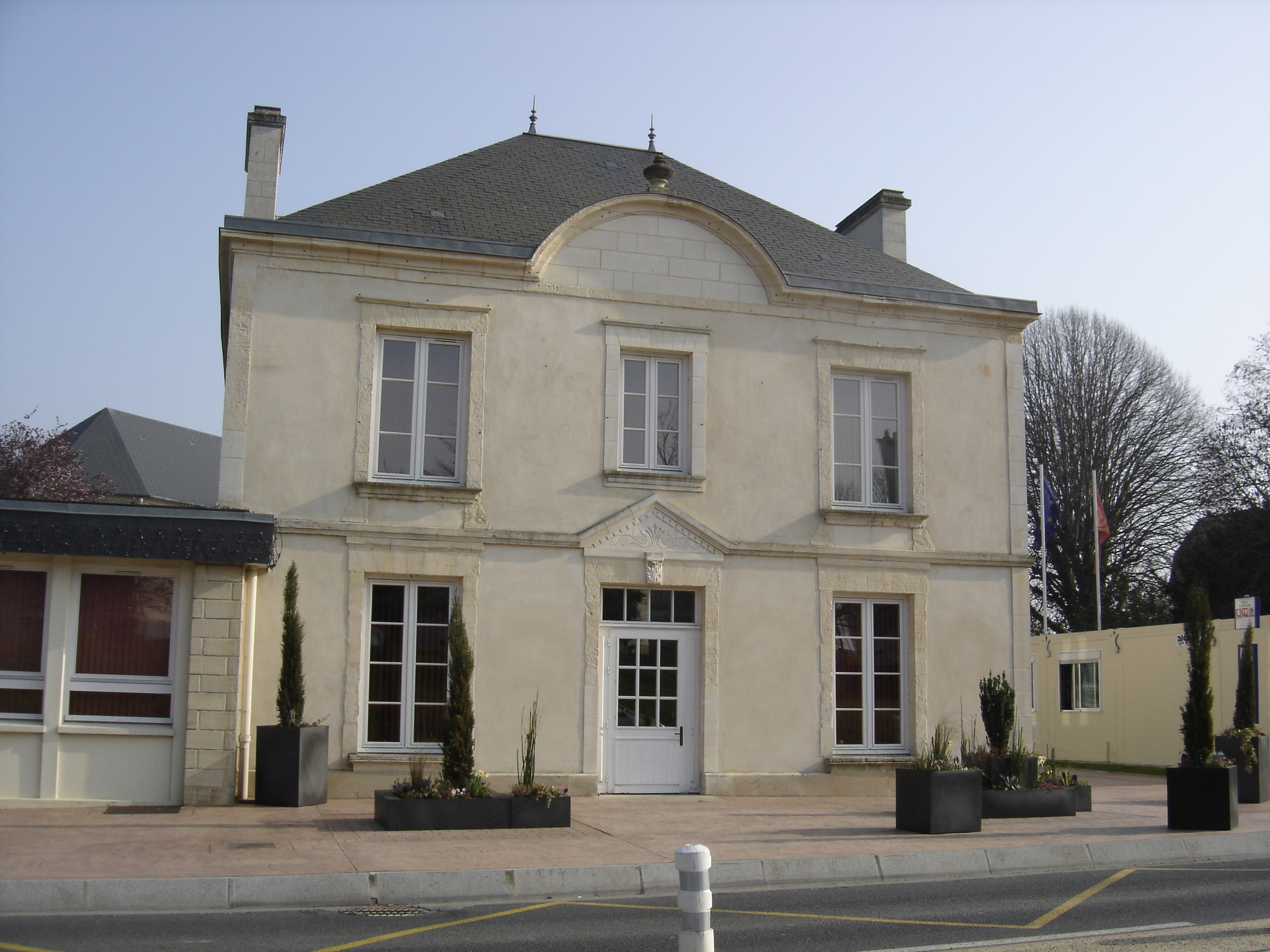 La mairie construite vers 1876 a servi également d'école